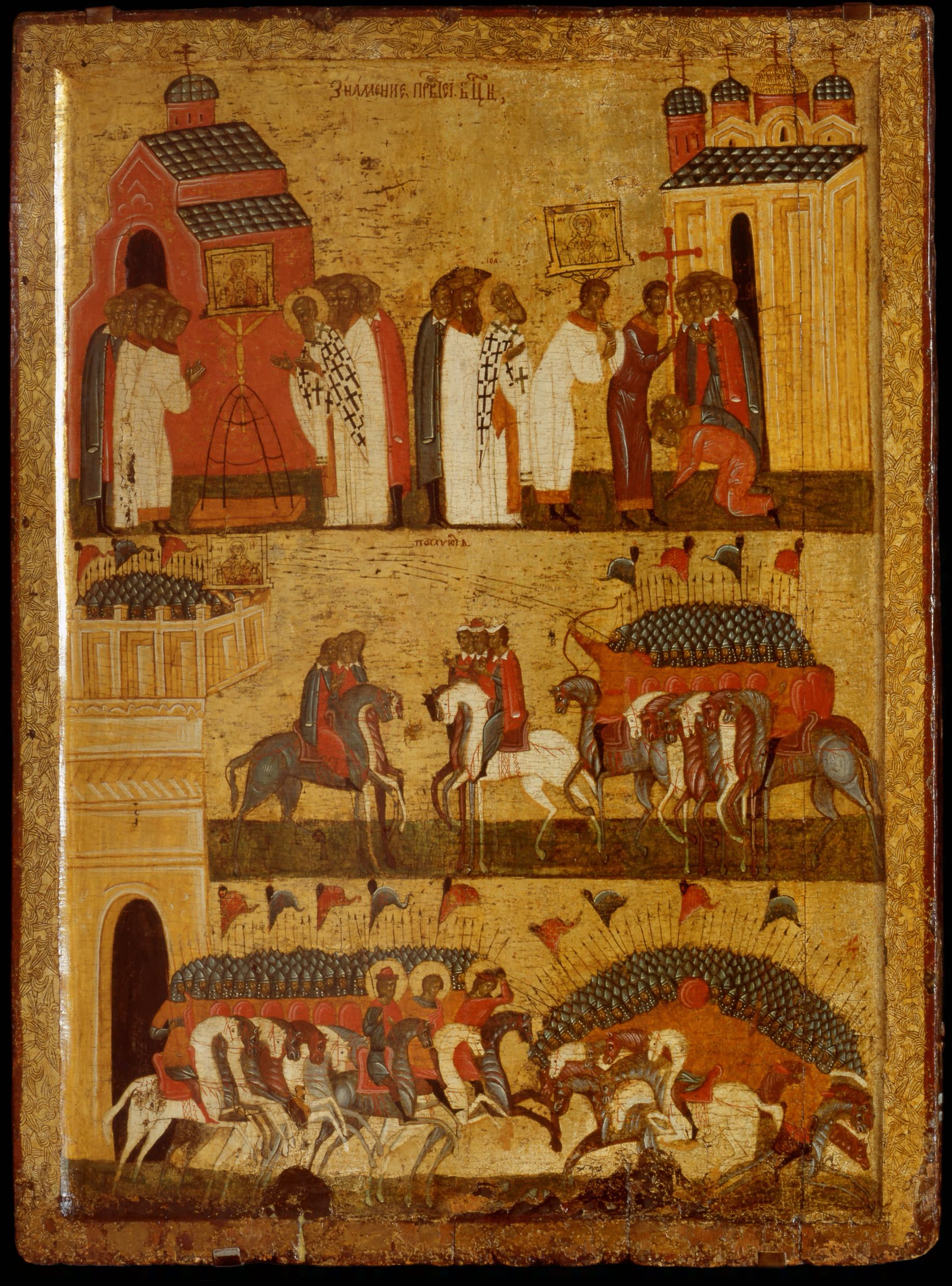 Битва новгородцев с суздальцами (Чудо от иконы "Знамение"). Новгород, середина XV века. Дерево, темпера. 133x90. Государственная Третьяковская галерея. В основе сюжета иконы лежит действительное историческое событие. В 1169 году войска суздальского князя Мстислава Андреевича, сына Андрея Боголюбского, осадили Новгород, но не смогли взять его, благодаря чуду от новгородской святыни – иконы «Богоматерь Знамение». На иконе последовательно раскрывается это событие. В верхнем регистре – новгородцы молятся перед иконой «Богоматерь Знамение» у церкви Спаса на торговой стороне, затем переносят ее в детинец к собору Святой Софии. В среднем регистре – послы ведут переговоры и одновременно начинаются военные действия, суздальцы мечут стрелы в икону «Богоматерь Знамение». Икона, стоящая на башне, заслоняет собой новгородцев и ослепляет врагов. В нижнем регистре изображено выступающее из крепостных ворот новгородское войско, которое возглавляют святые воины Георгий, Борис и Глеб. Справа – разбитое смятенное войско суздальцев. «Знамение от иконы Богородицы (Битва новгородцев с суздальцами)» – яркий, характерный пример новгородской иконописи эпохи расцвета. В ней воплощена мощная духовная энергия; композиция отличается ясностью, выверенностью и четкостью построения; цветовая гамма с преобладанием киновари глубоко самобытна.